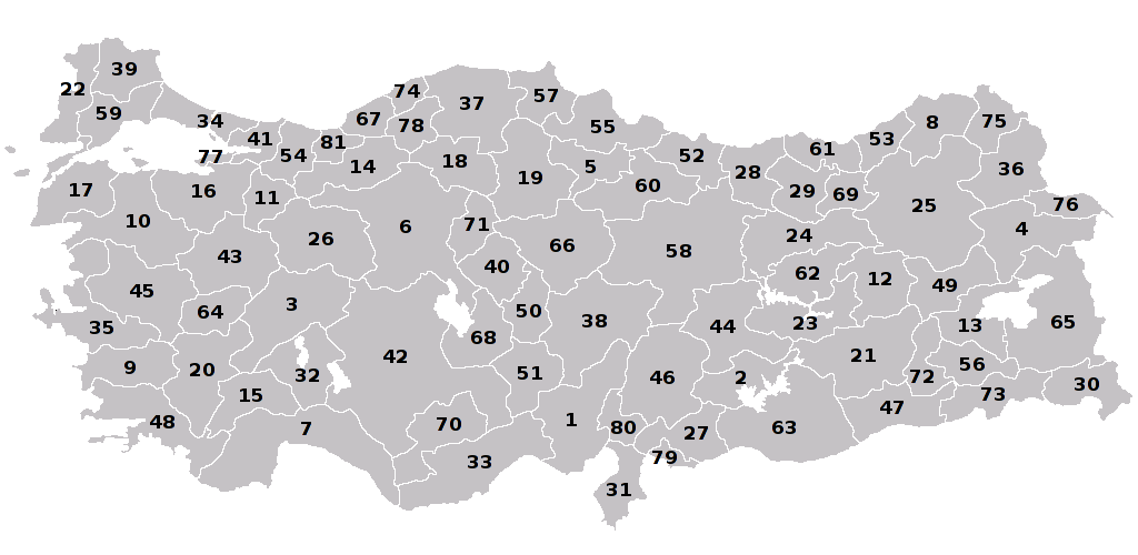 土耳其分省圖。